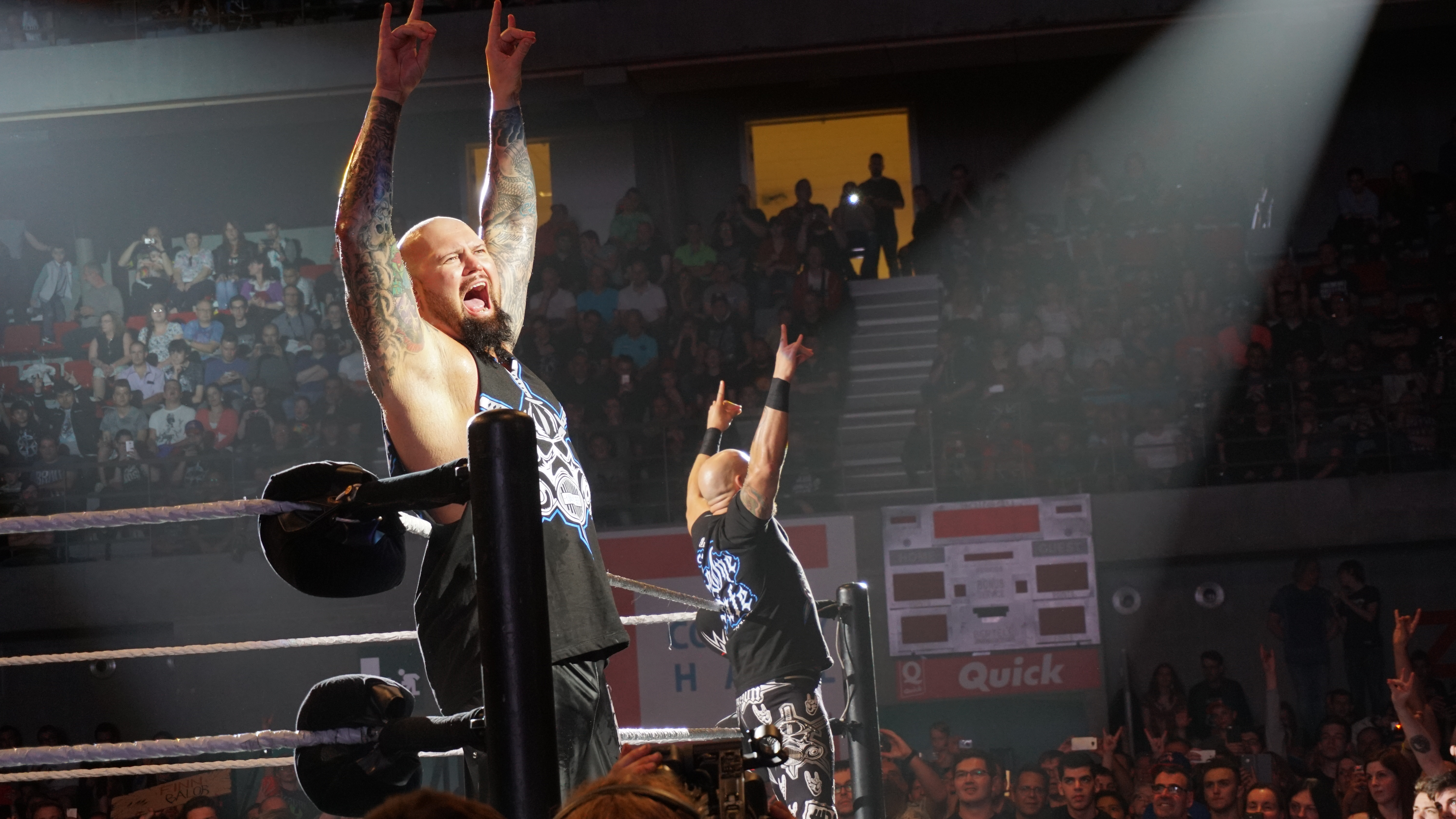 Finn Balor defeats Karl Anderson (With Luke Gallows) ( Le vendredi 12 mai, la WWE Live Tour fera escale au Country Hall a Liege pour le spectacle de catch de l'annee! Au programme: des duels impitoyables et des rencontres captivantes entre les meilleures equipes et les plus grands rivaux. )